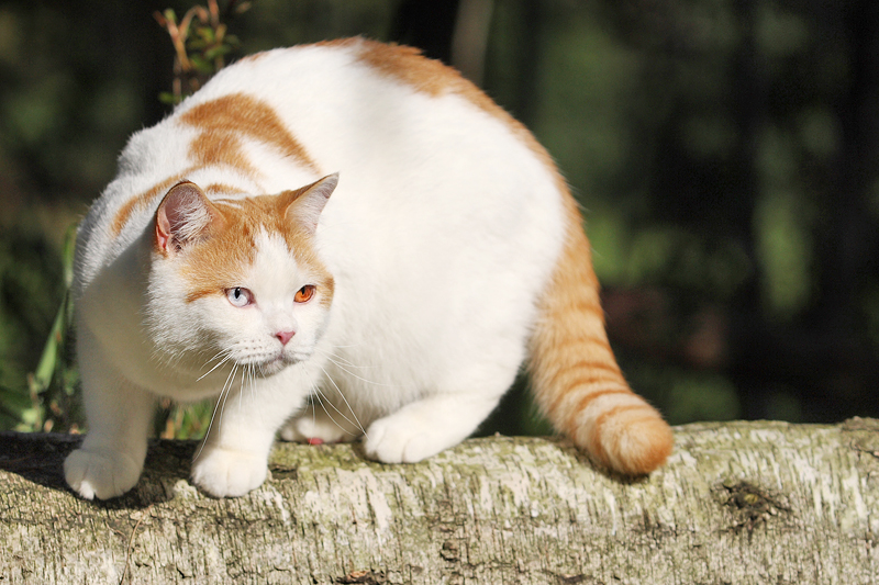 Britisch Kurzhaar Kater, 1 Jahr alt, in der Farbe red-white-Harlekin mit 2 verschieden farbigen Augen (odd eyed)